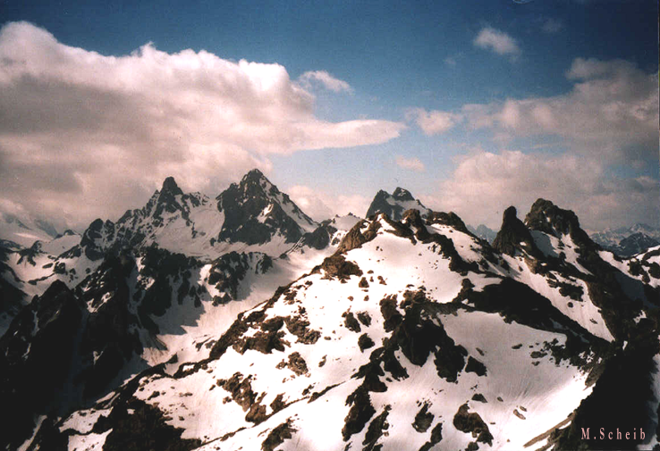 Silvretta/ Blick von der Nördlichen Valgragesspitze (2793m) nach Südosten. Rechts/Mitte: Valgrageskamm, Links/Mitte: Litzner-Seehörnergruppe, hinten links die Sonntagsstpitze